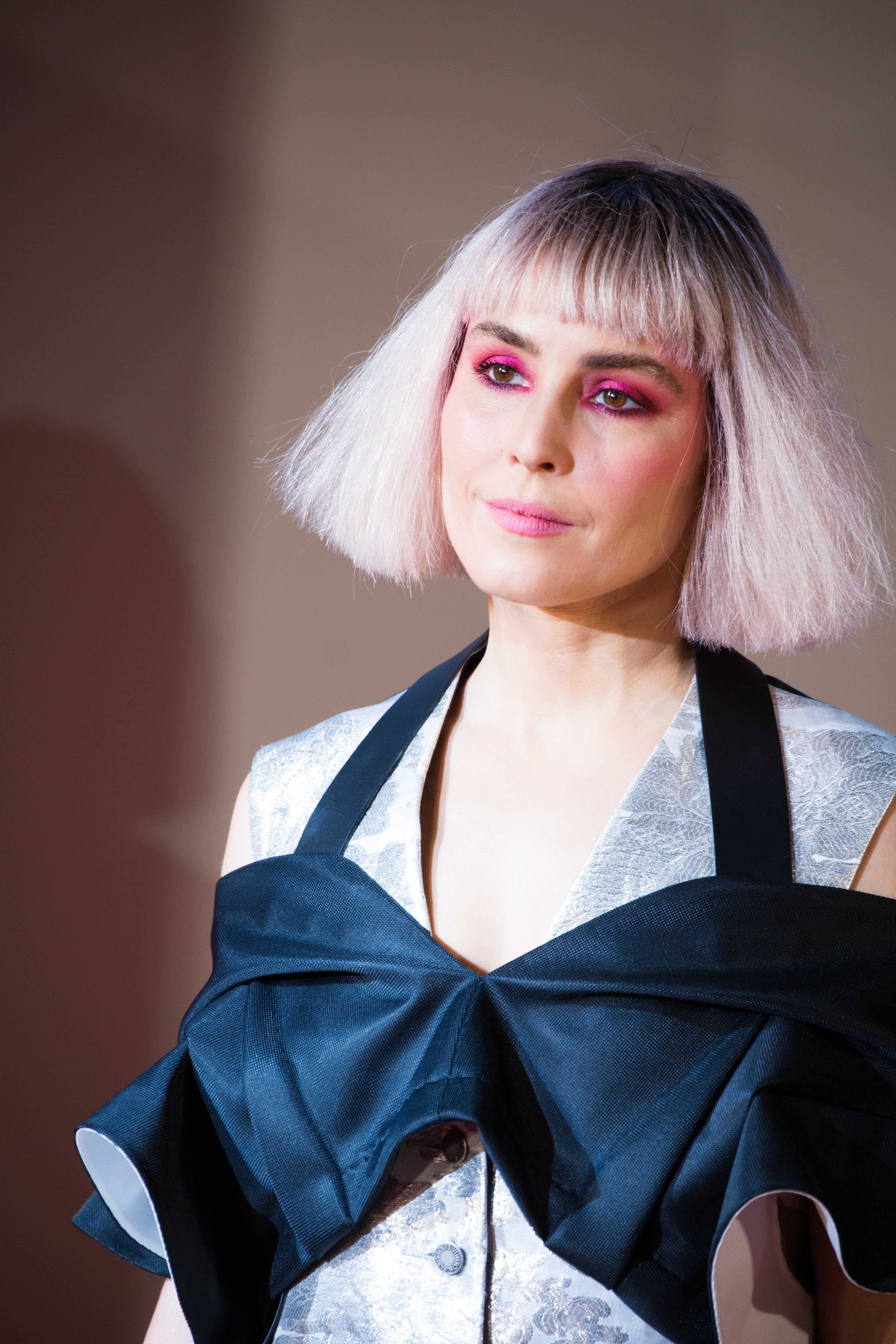 ブライト ジャパン・プレミア レッドカーペット ノオミ・ラパス